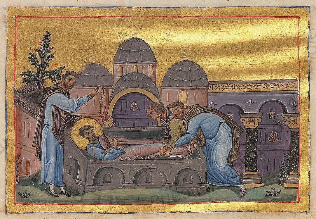 Константинополь. 985 г. Миниатюра Минология Василия II. Ватиканская библиотека. Рим.